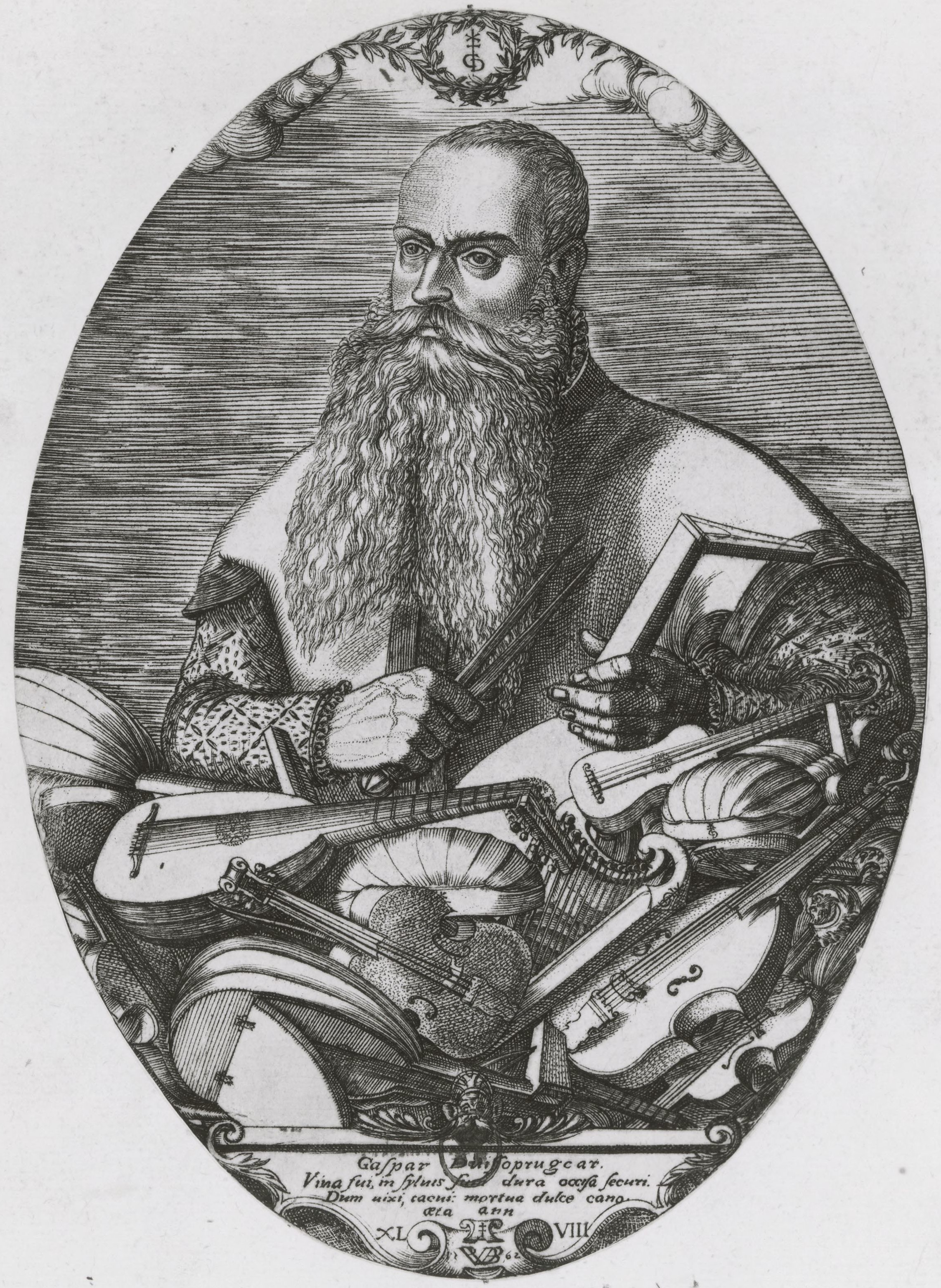 Portrait de Gaspar Duiffoprugear / Pierre II Woeiriot de Bongey